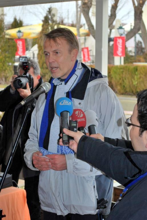 Eesti suursaadik Türgis Aivo Orav tervitamas EV 93. aastapäeva tähistamiseks Ankara lähistel Gölbaşı järve ääres toimuva kepikõnniüritusele tulijaid